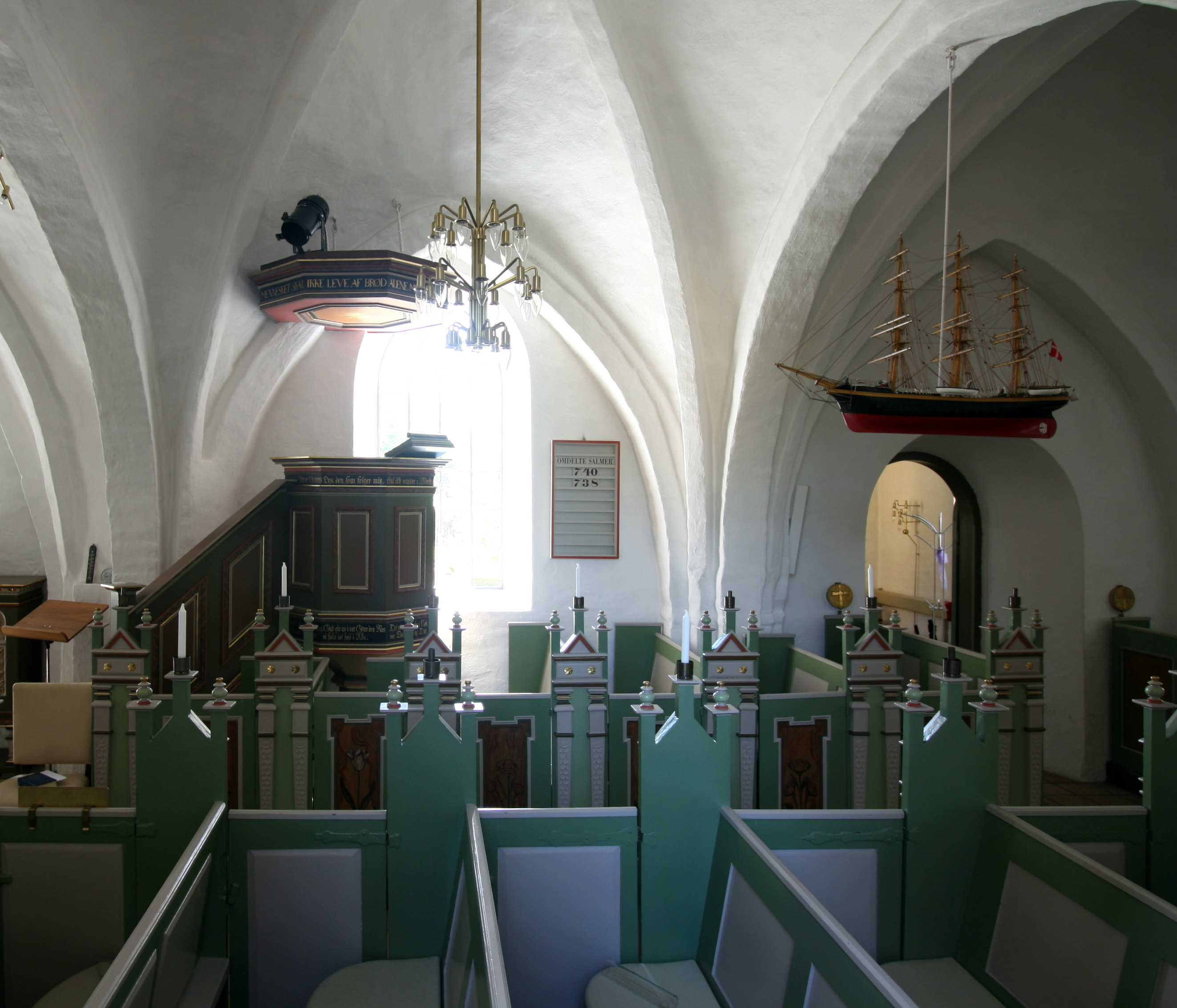 Ølsemagle Kirke, near Køge, Denmark. Interior from north.